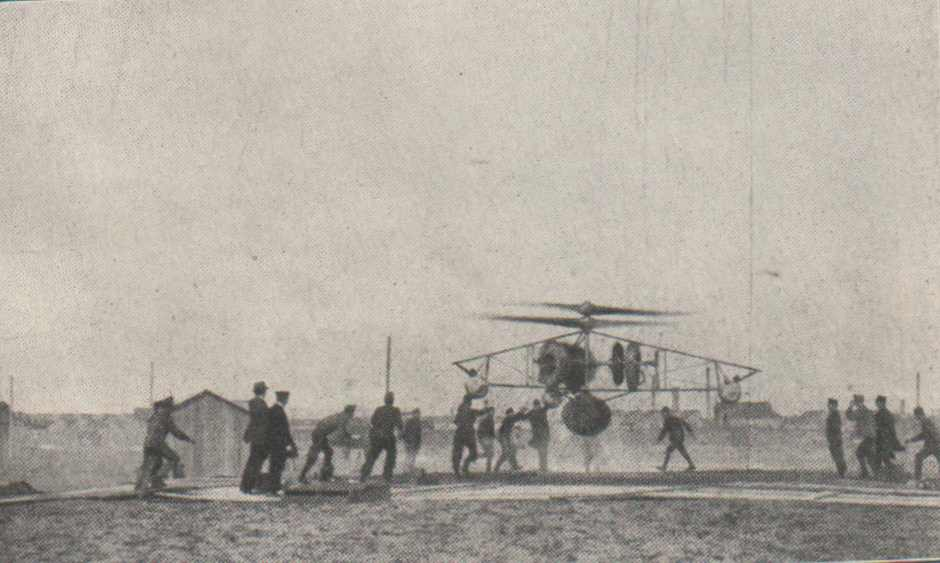 Kísérlet az első magyar helikopterrel